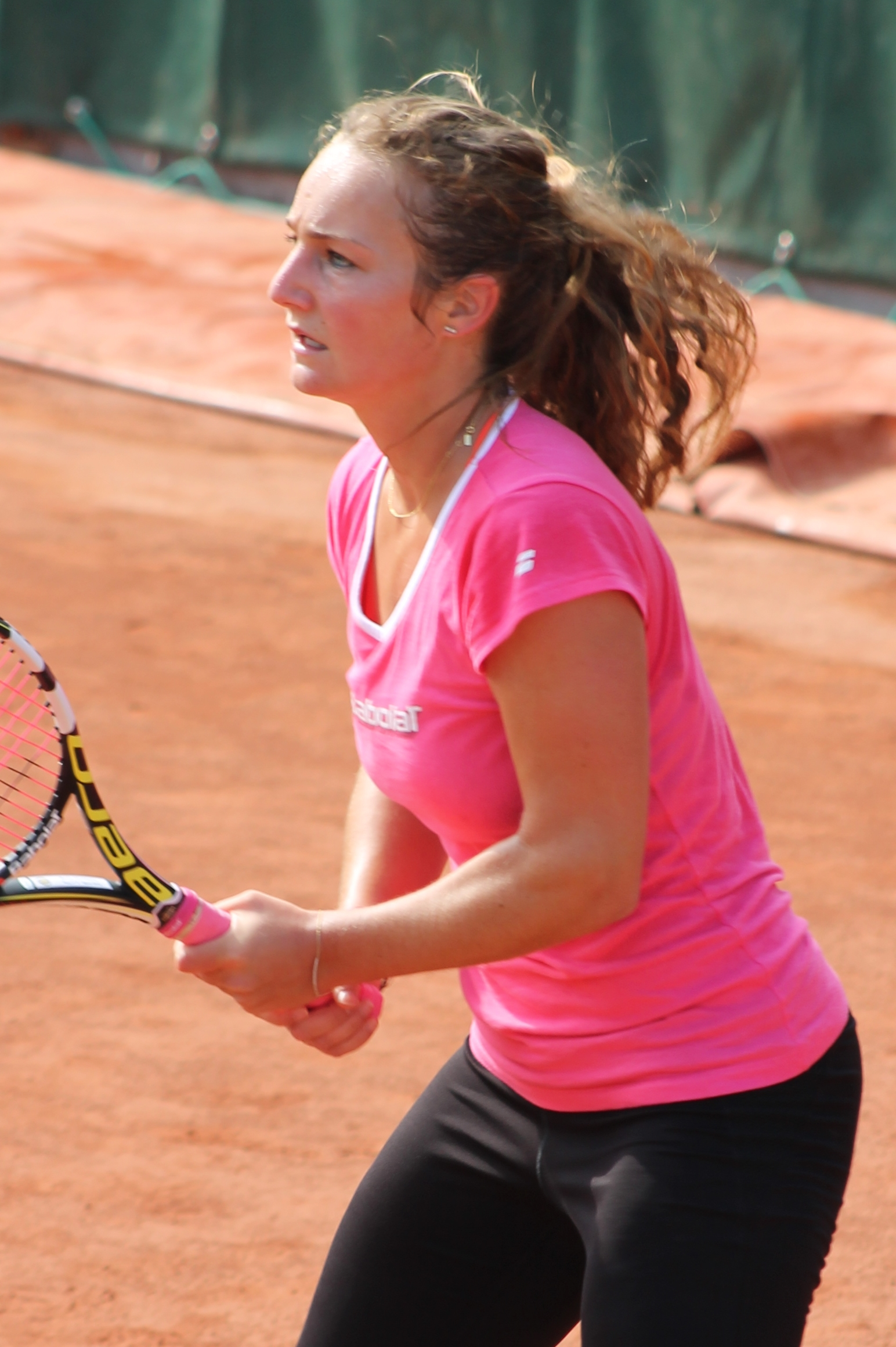 Arcangioli RG15 (3)